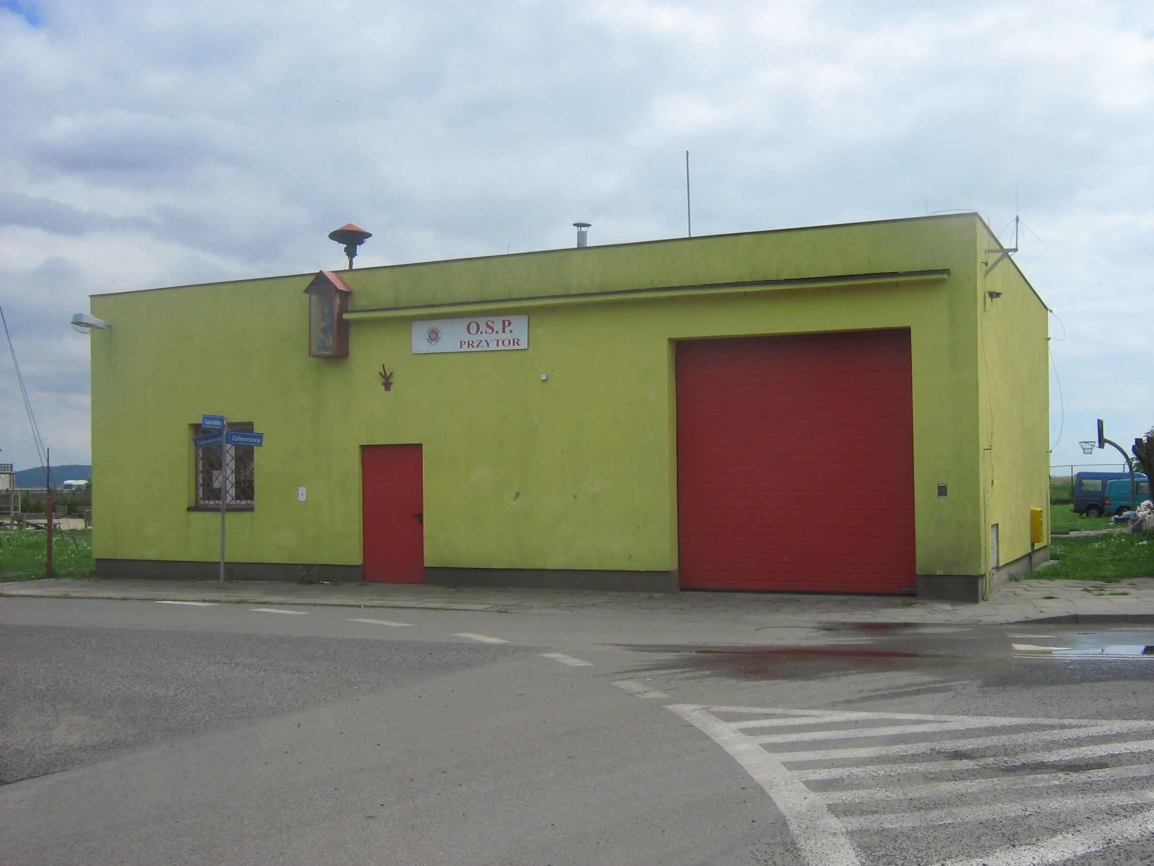 OSP w Przytorze